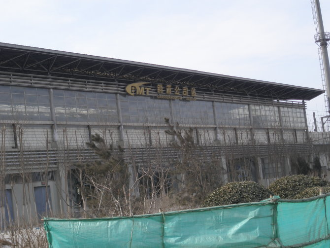 天津地铁九号线钢管公司站